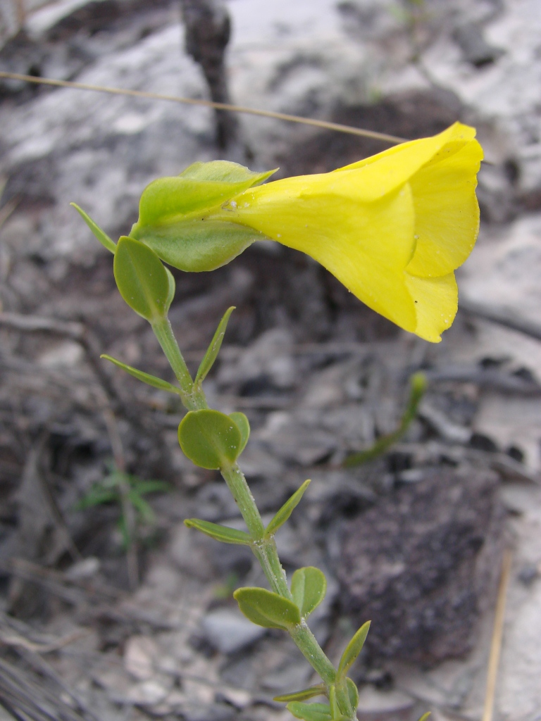 Schultesia crenuliflora Mart. - GENTIANACEAE - Parque Nacional da Chapada Diamantina - Palmeiras - Bahia - Brasil.